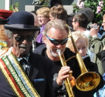 Parade, Molde Jazz festival